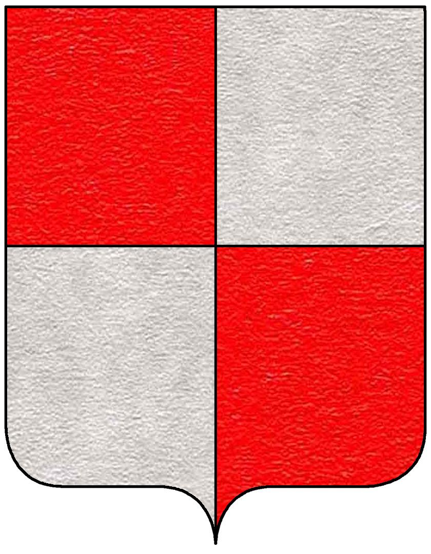 Stemma della famiglia Zaccaria Poma